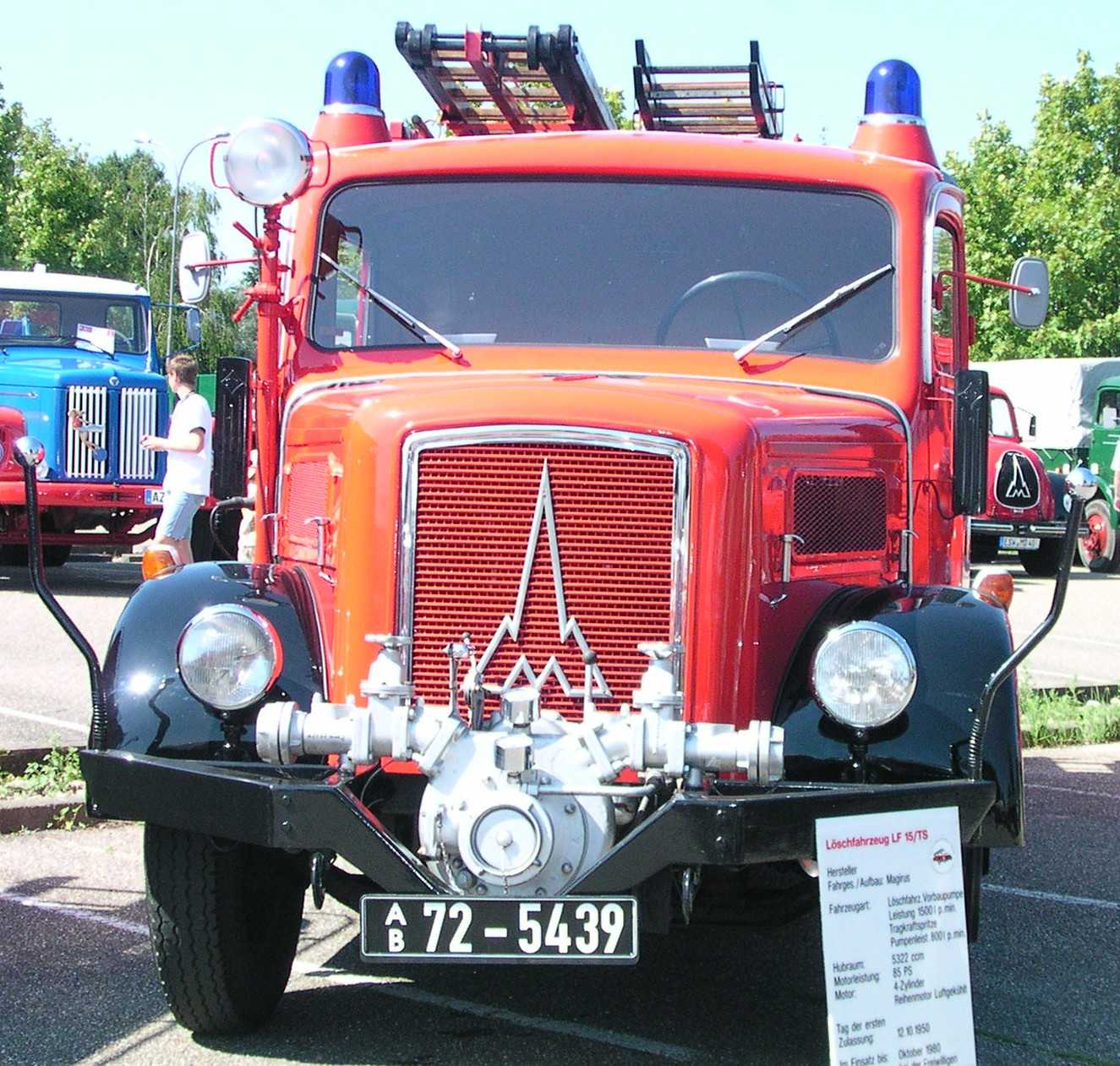 Wörth am Rhein, Oldtimertreffen bei Daimler-Chrysler Magirus-Feuerwehrwagen mit Vorbaupumpe (1500 l/min), Erstzulassung 1950, bis 1980 bei der Feuerwehr Kissingen im Einsatz, 5322 ccm Hubraum, 63 kW (85 PS)